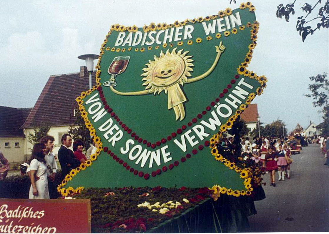 Erzinger Winzerfest in der Ortschaft Erzingen (Klettgau) im Landkreis Waldshut in Baden-Württemberg. Umzugswagen mit dem Motto zum „Badischen Wein“ 1971.